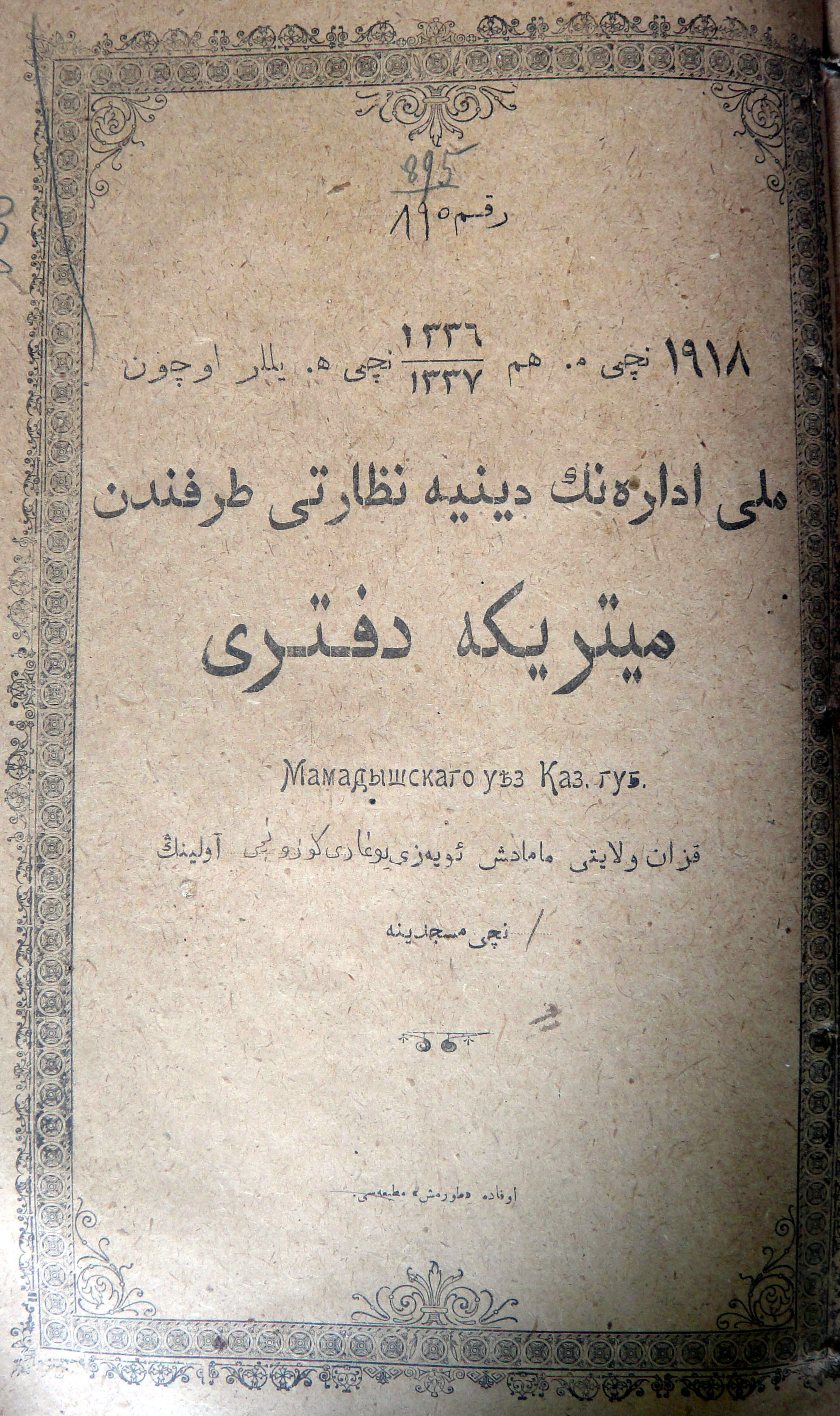 Снимок сделан в Национальном архиве Республики Татарстан, где хранится данный документ.